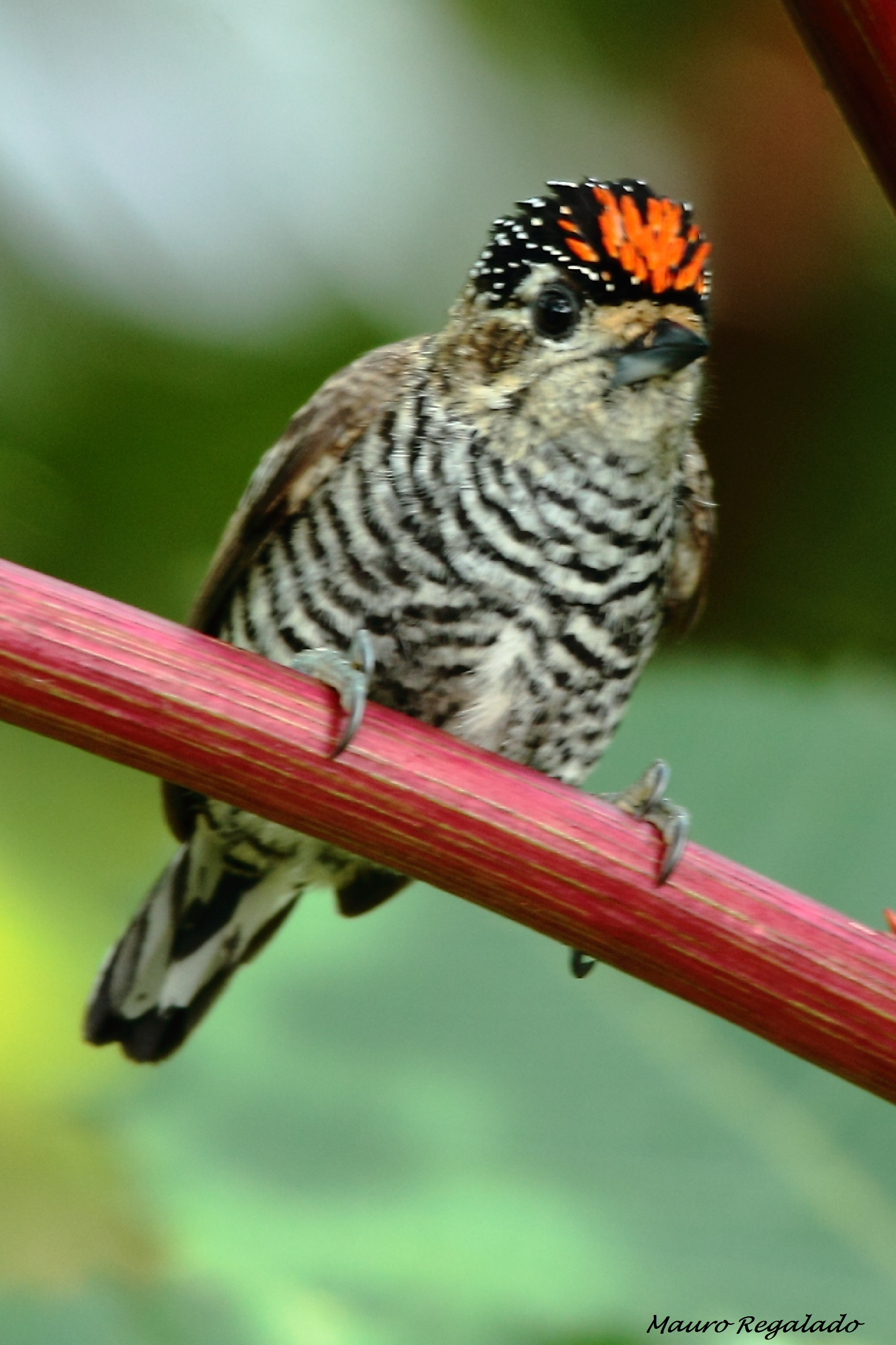 Pica-pau-anão-de-coleira (Macho) Picumnus temminckii (animal - cordado - tetrapoda - Aves)